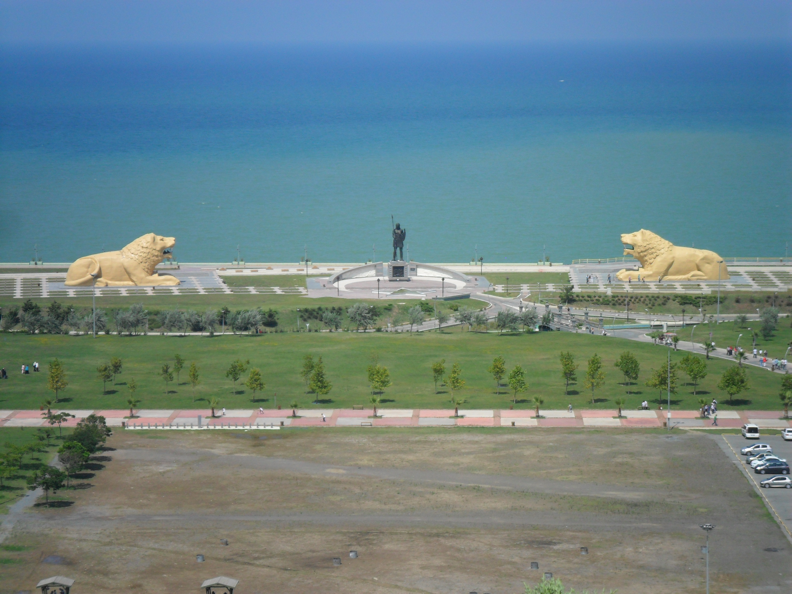 Amisos Tepesi'nden çekilen bir fotoğraf.